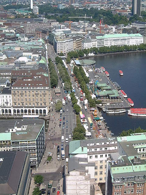 Jungfernstieg Hamburg von St.Petri